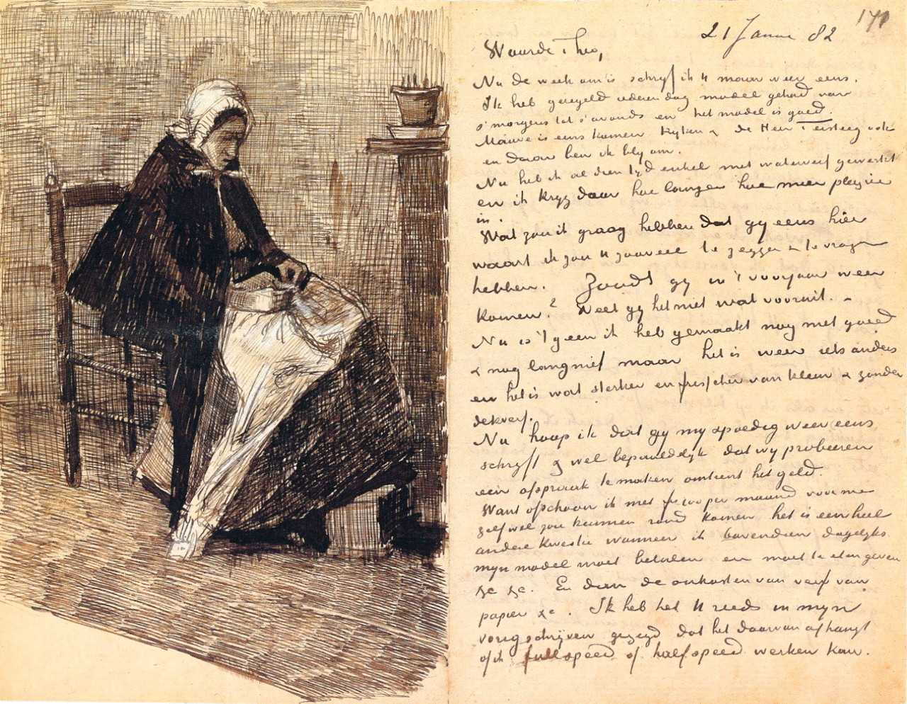 lettera con il disegno di una donna scritta da Vincent van Gogh